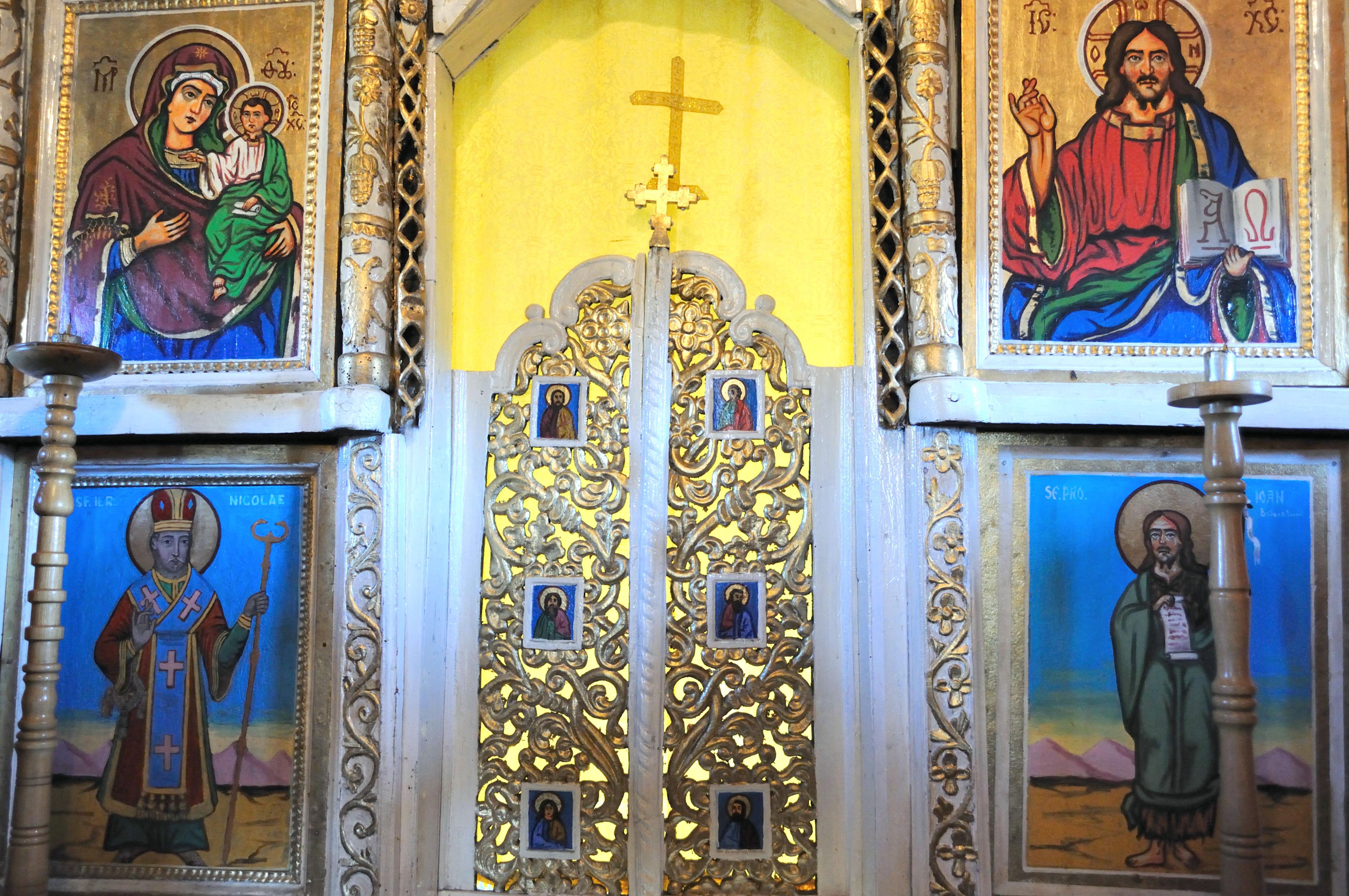 Biserica de lemn din Țăgșor, Bistrița-Năsăud